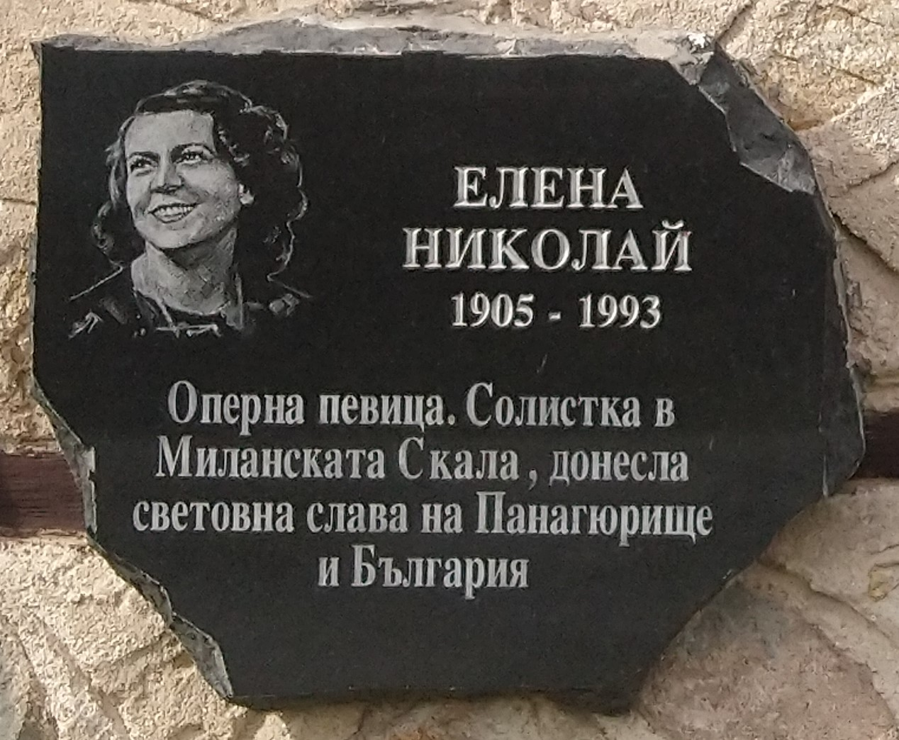 Елена Николай (1905 - 1993) - плоча в Исторически музей Панагюрище - Надпис: Оперна певица. Солистка в Миланската Скала, донесла световна слава на Панагюрище в България.